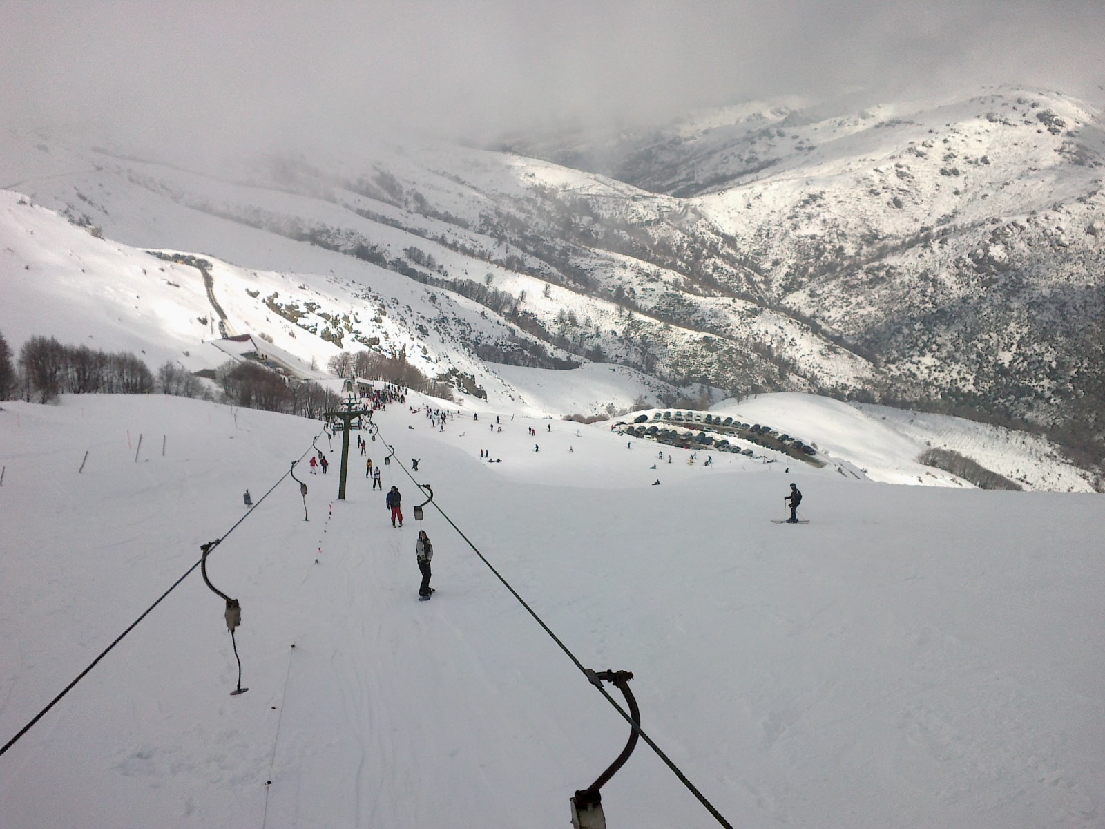 Foto dello skilift del Bruncu Spina